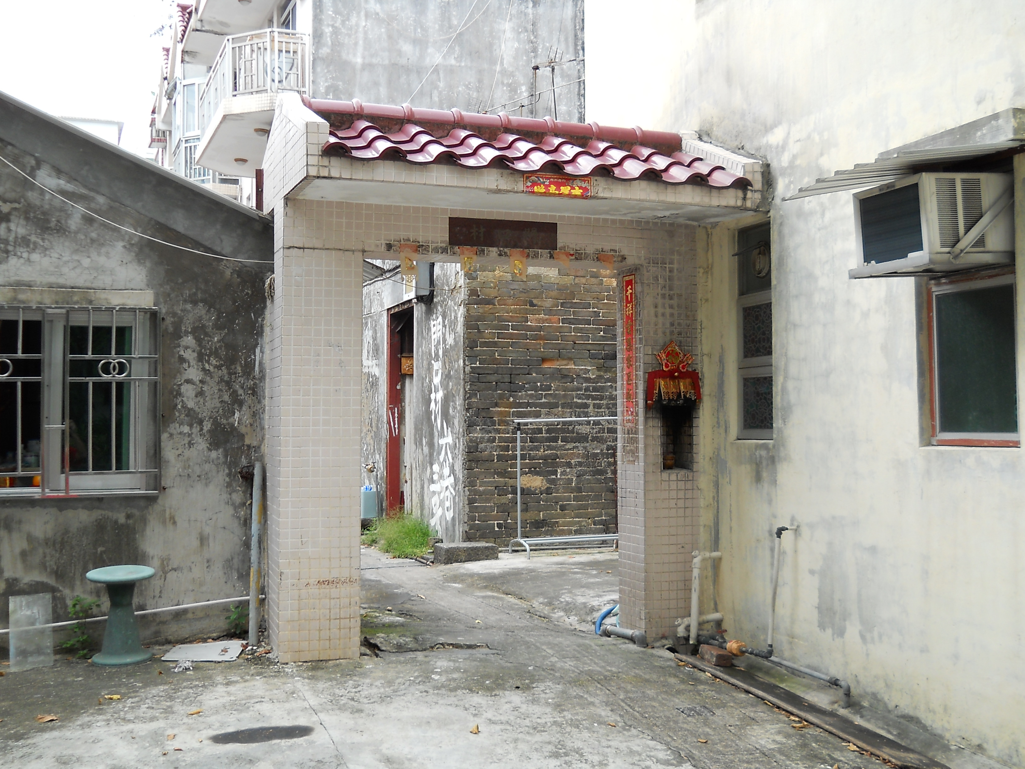 中文（香港）: 上水圍門口村